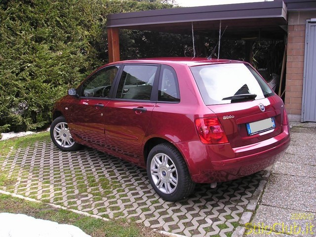 Fotografia Fiat Stilo my2004 5 porte parte posteriore, autore Mmartin-StiloTuningClub, licenza d'uso